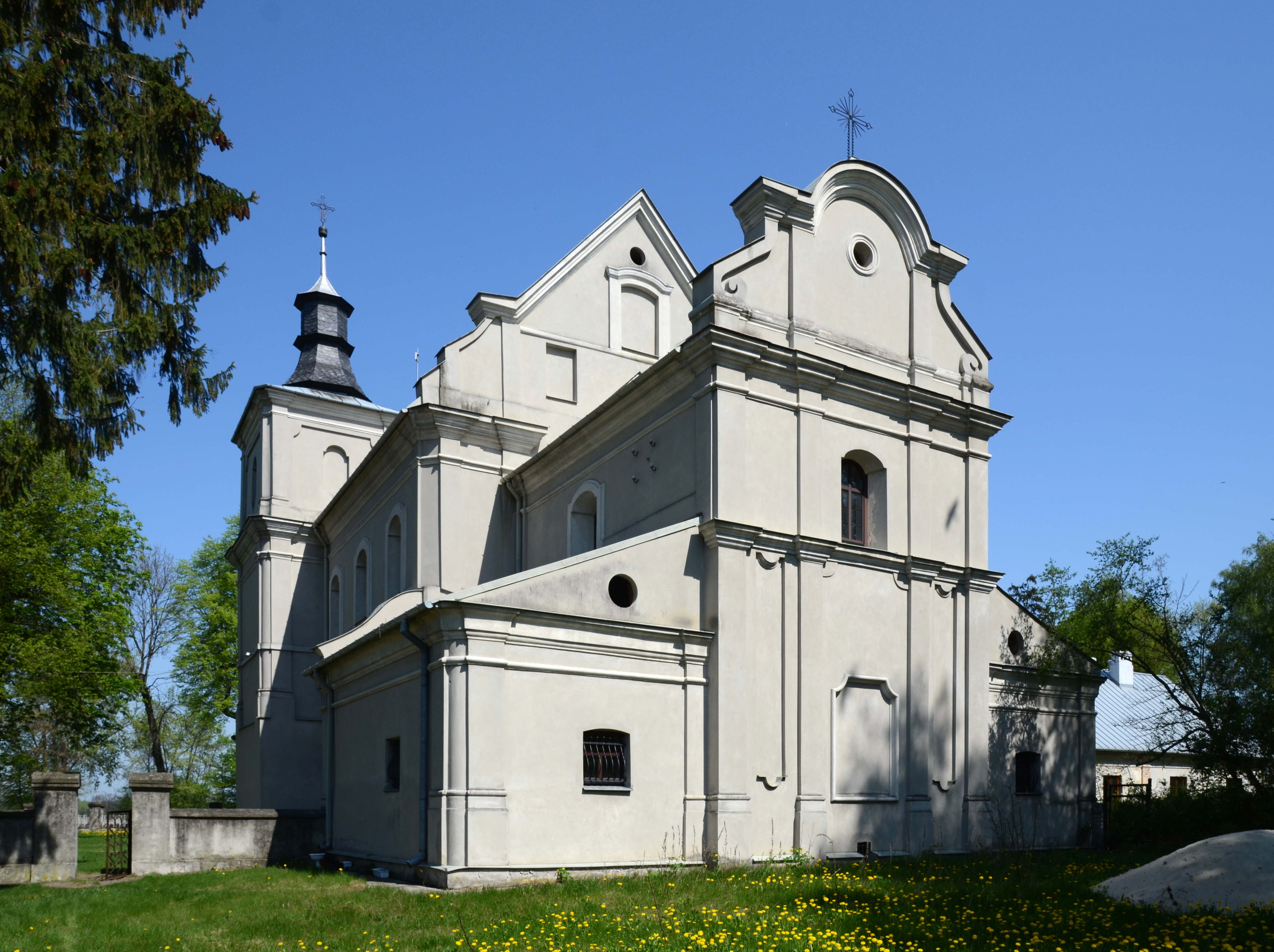 Kościół pw. św. Anny, dawniej w klasztorze Bernardynów.